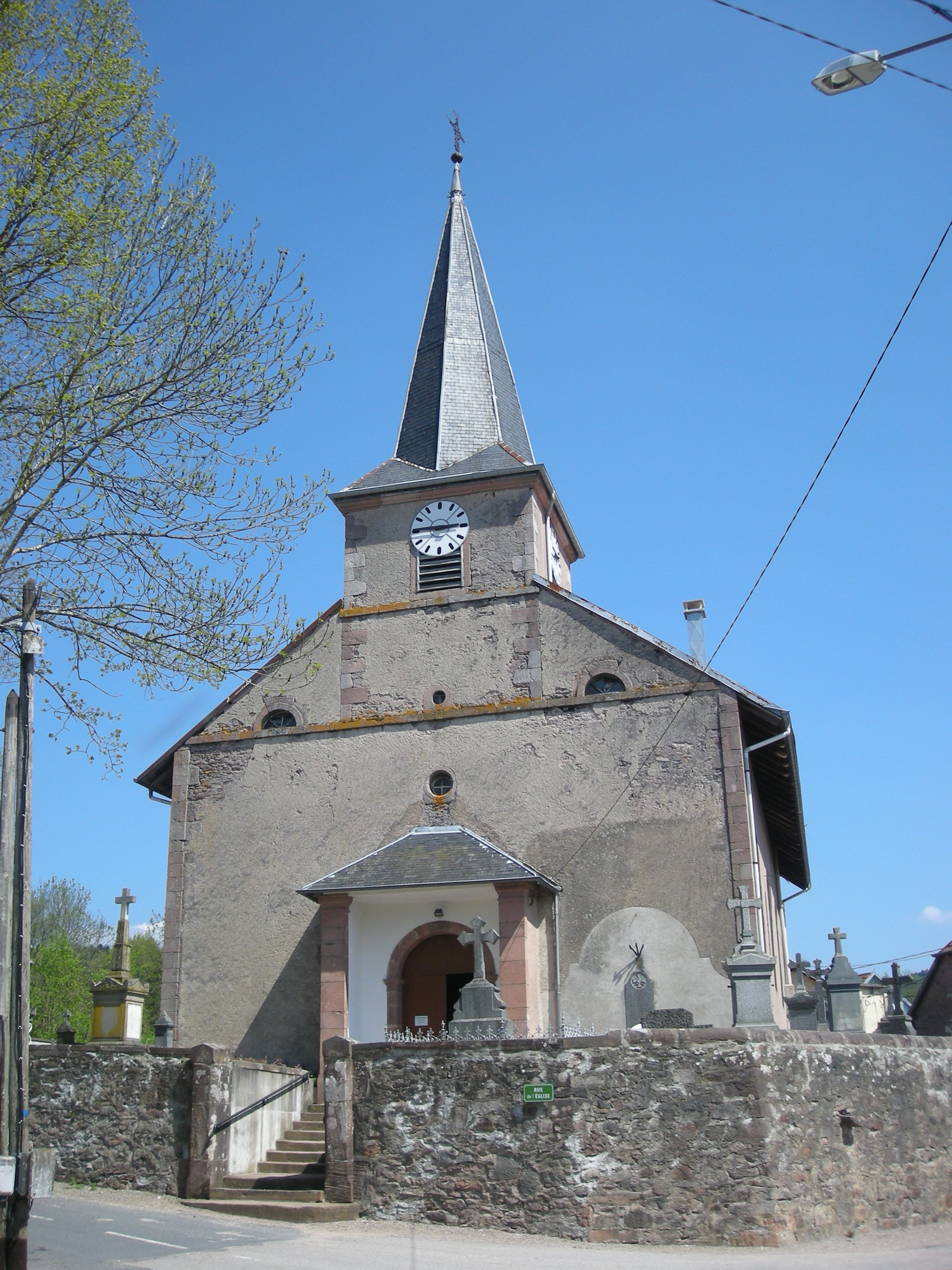 L'église de Coinches (département des Vosges)